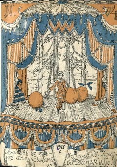 Обложка номера журнала "Любовь к трем апельсинам" за 1915 г.